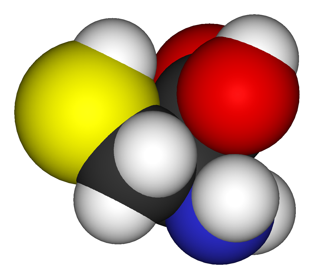 L-cysteine 3-D